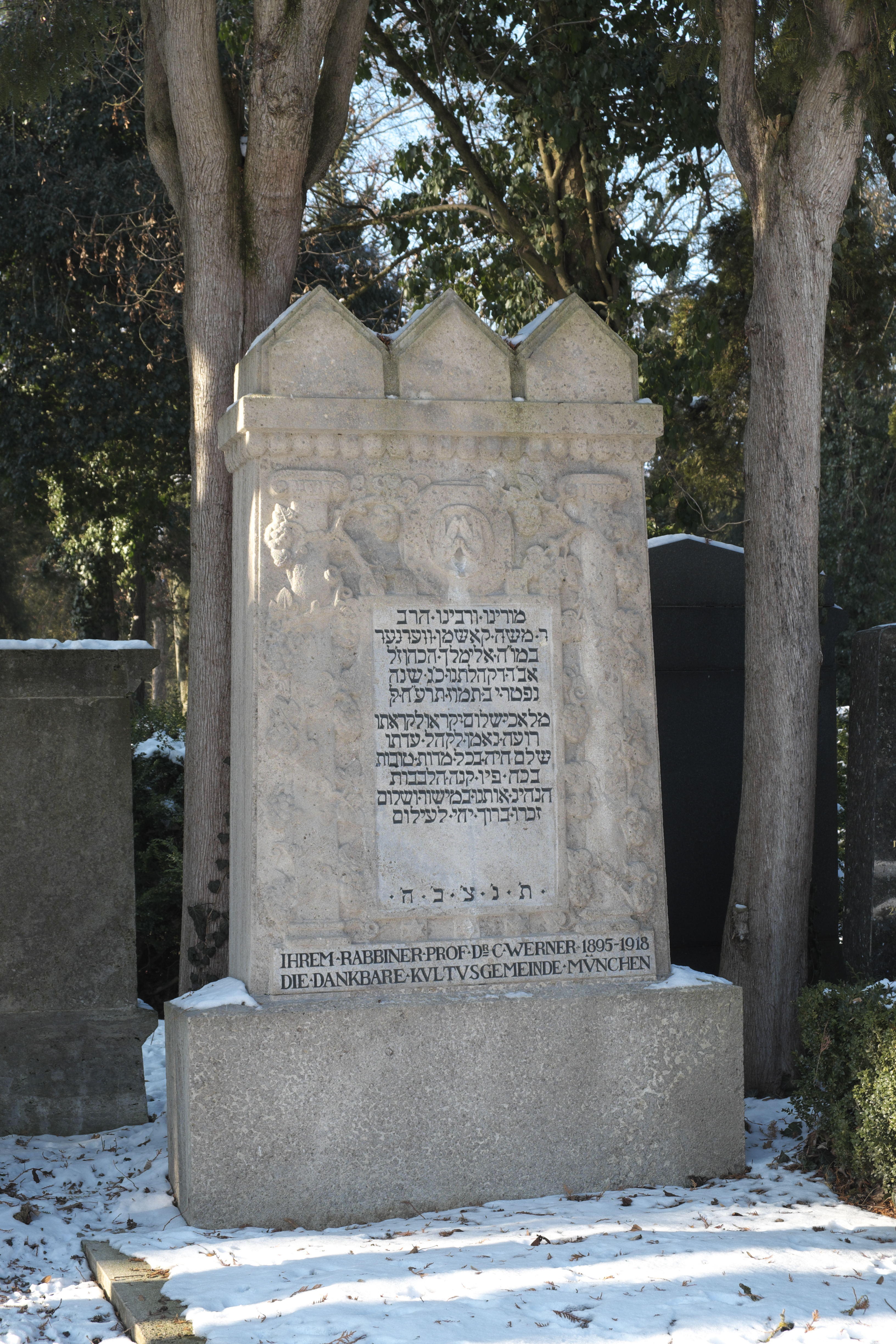 Neuer Israelitischer Friedhof im Stadtteil Freimann (Stadtbezirk Schwabing-Freimann) in München (Bayern/Deutschland)